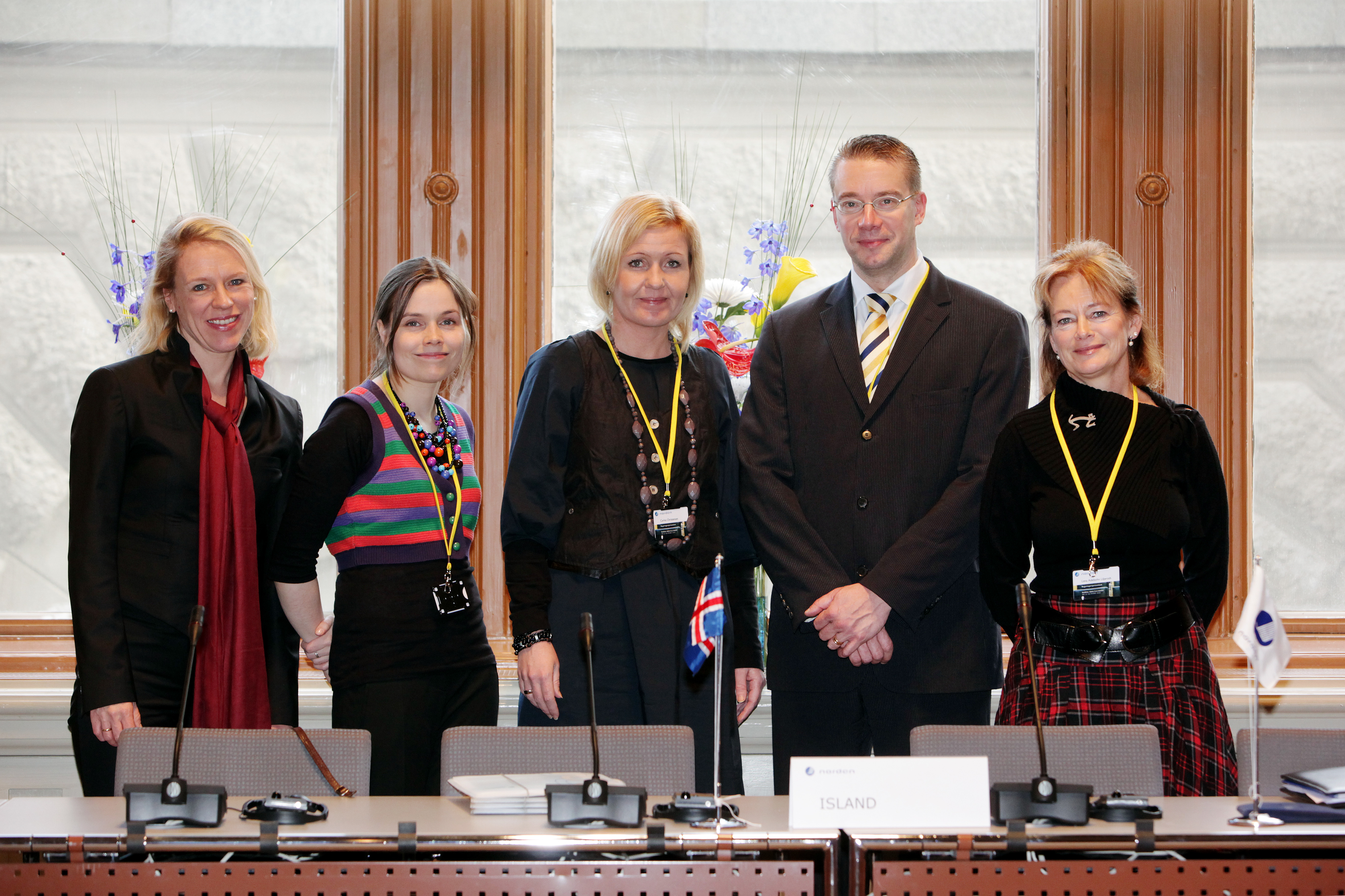 De nordiska kulturministrarna vid Nordiska Rådets session i Stockholm.